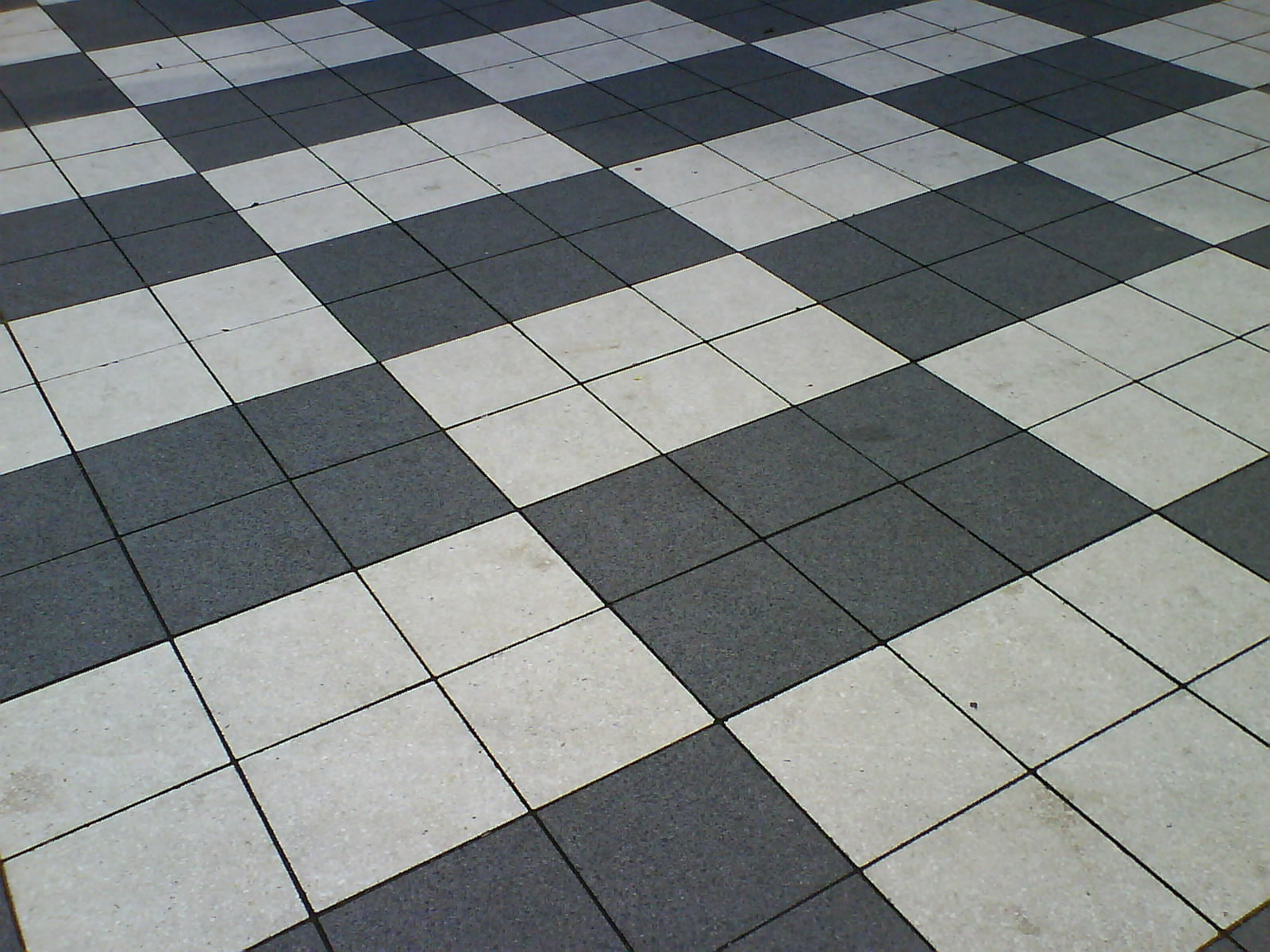 Pflasterung auf dem Scheidemannplatz in Kassel